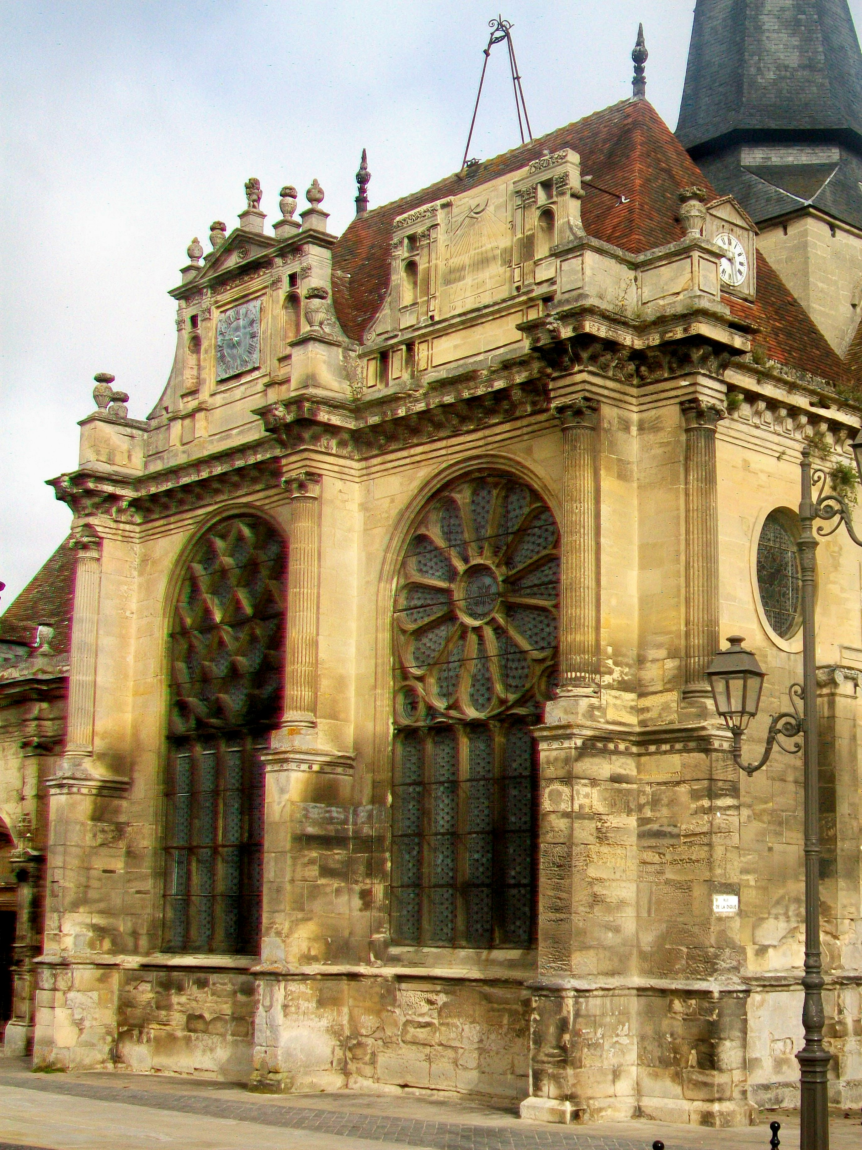 Vue rapprochée de la façade principale sud-est du bras sud du transept.